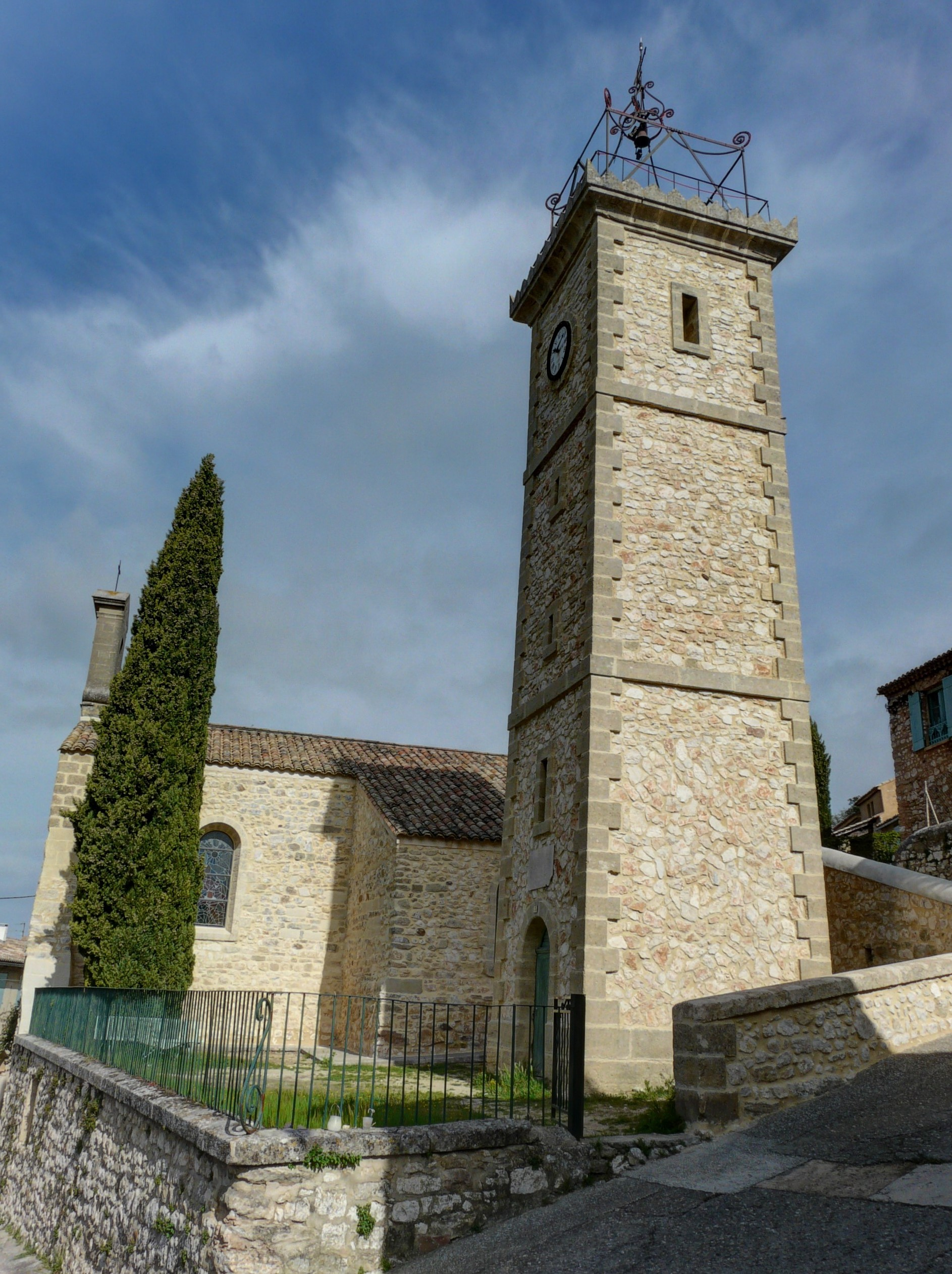 eglise Saint-Victor-des-Oules